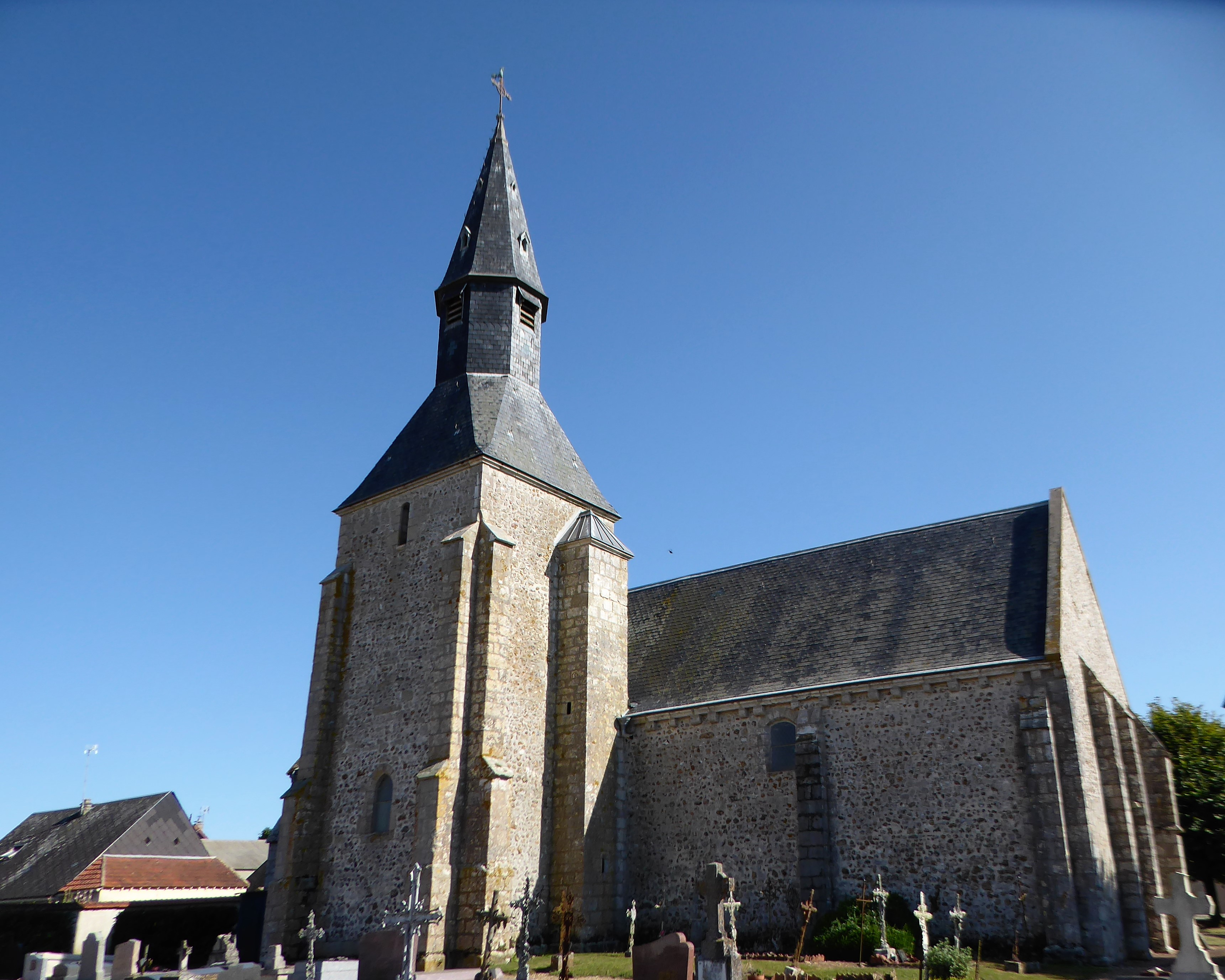 église Saint-Sulpice, Boncé, Eure-et-Loir, France.